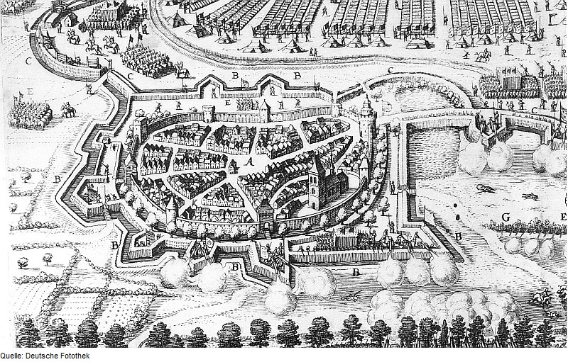 Original image description from the Deutsche Fotothek Werben (Elbe). Ausschnitt aus: Königlich Schwedisches Feldlager vor der Stadt, 1631, aus: Wollesen, Ernst: Chronik der altmärkischen Stadt Werben, 1898